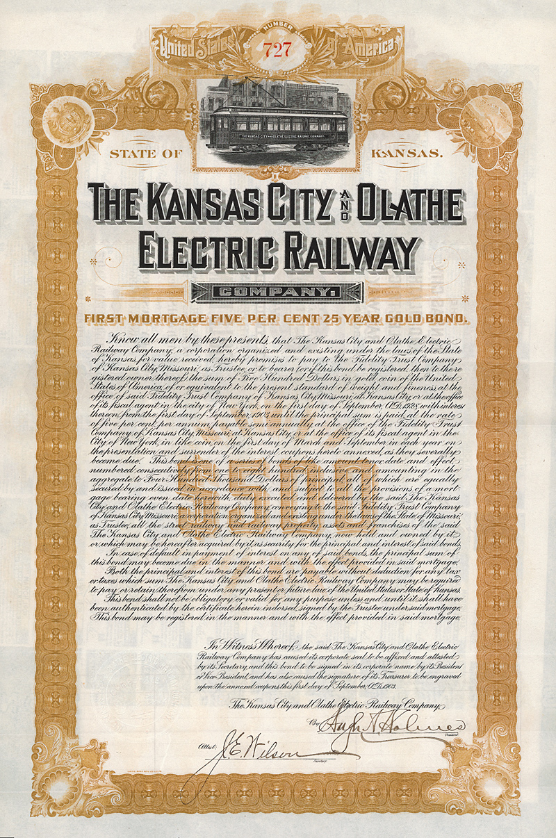 Bond of the Kansas City and Olathe Electric Railway from the 1st September 1903